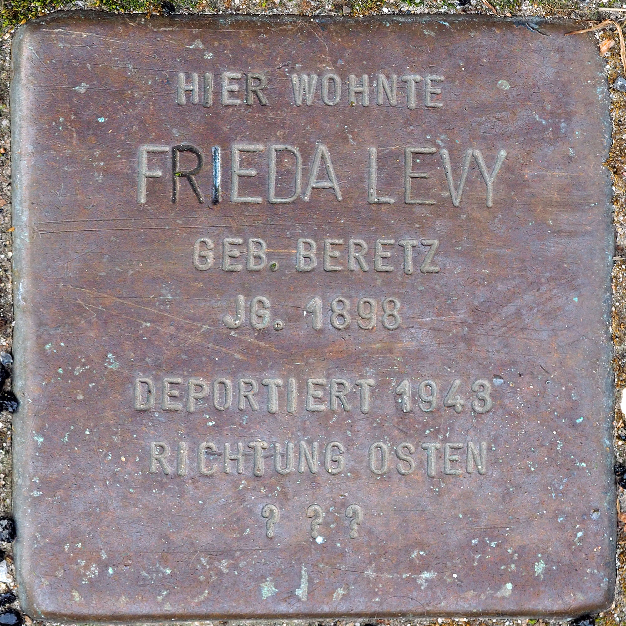 Stolpersteine MG: Levy, Frieda